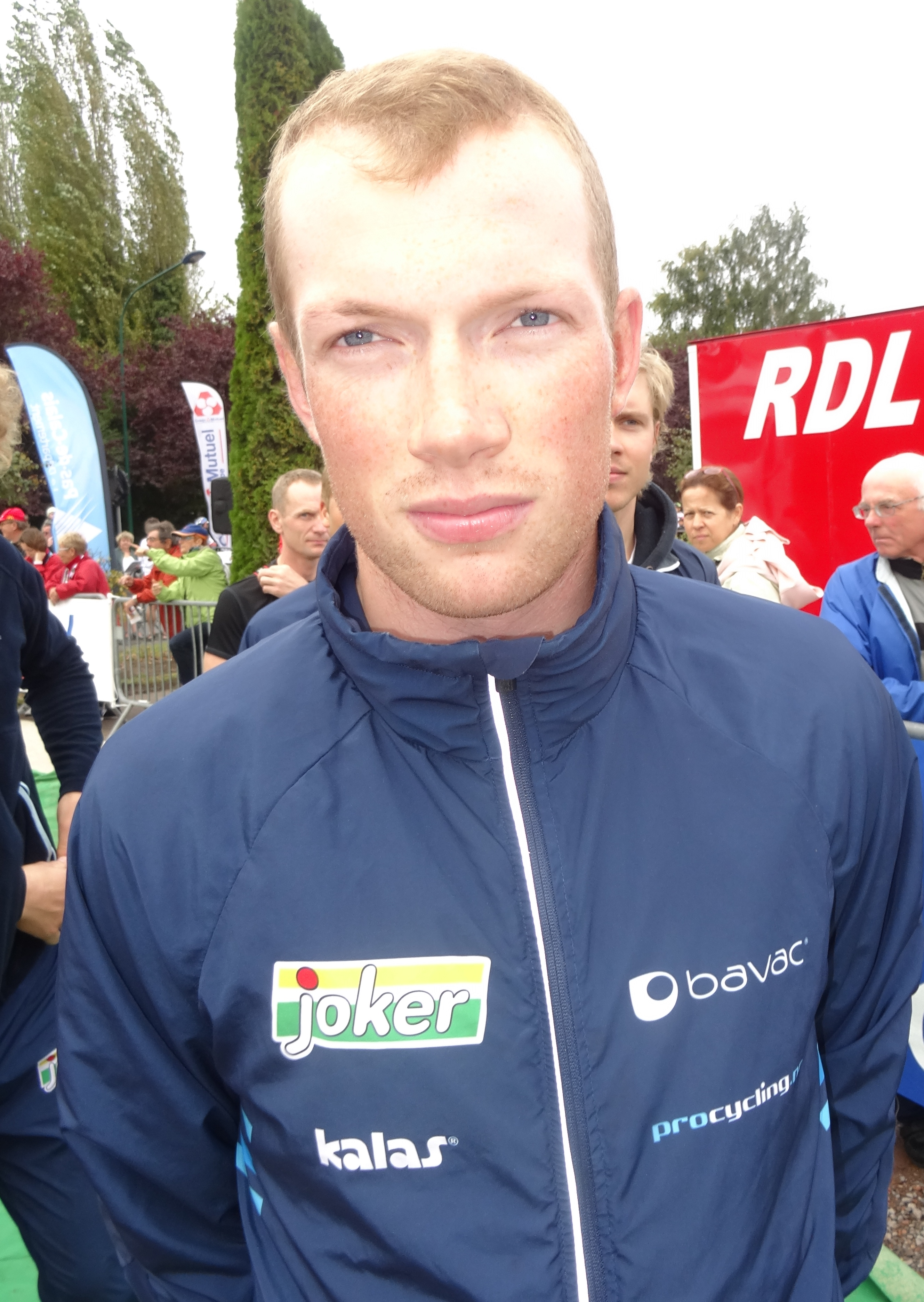 Reportage réalisé le dimanche 21 septembre à l'occasion du départ et de l'arrivée du Grand Prix d'Isbergues 2014 à Isbergues, Nord-Pas-de-Calais, France.